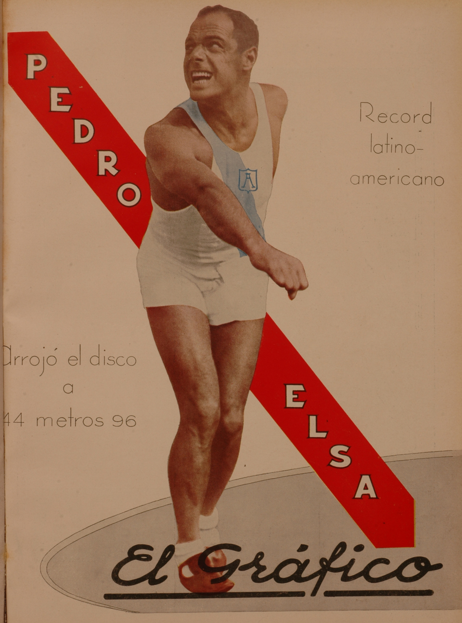 El Grafico del 28 de Mayo de 1932. Edicion 672